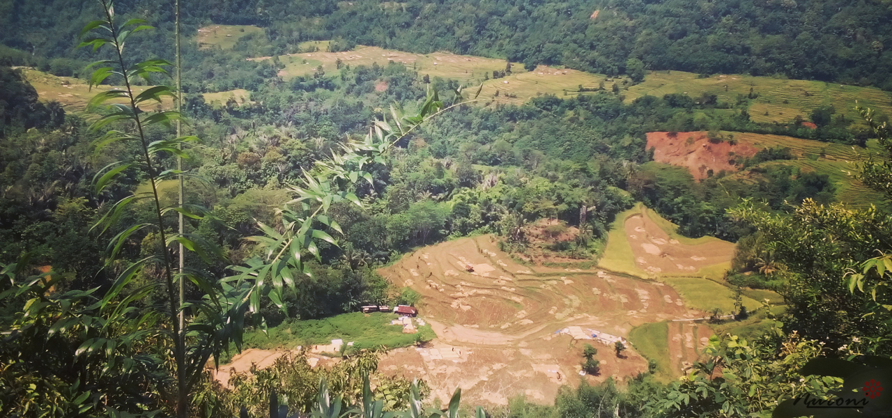 Sawah Nyalindung Pasirhuni Desa Cikadu, Cikadu, Cianjur, Jawa Barat, Indonesia